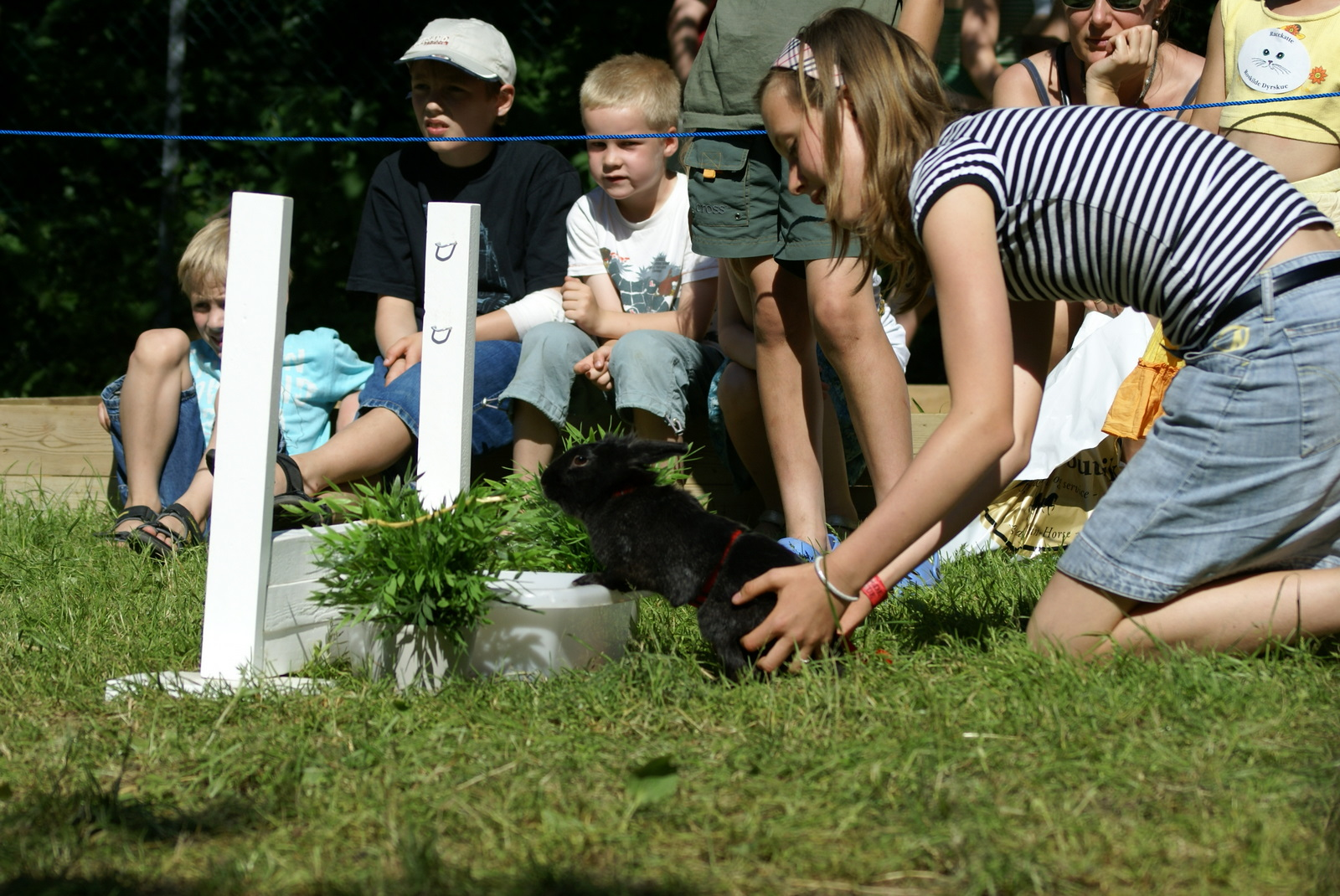 Roskildedyrskue-2592